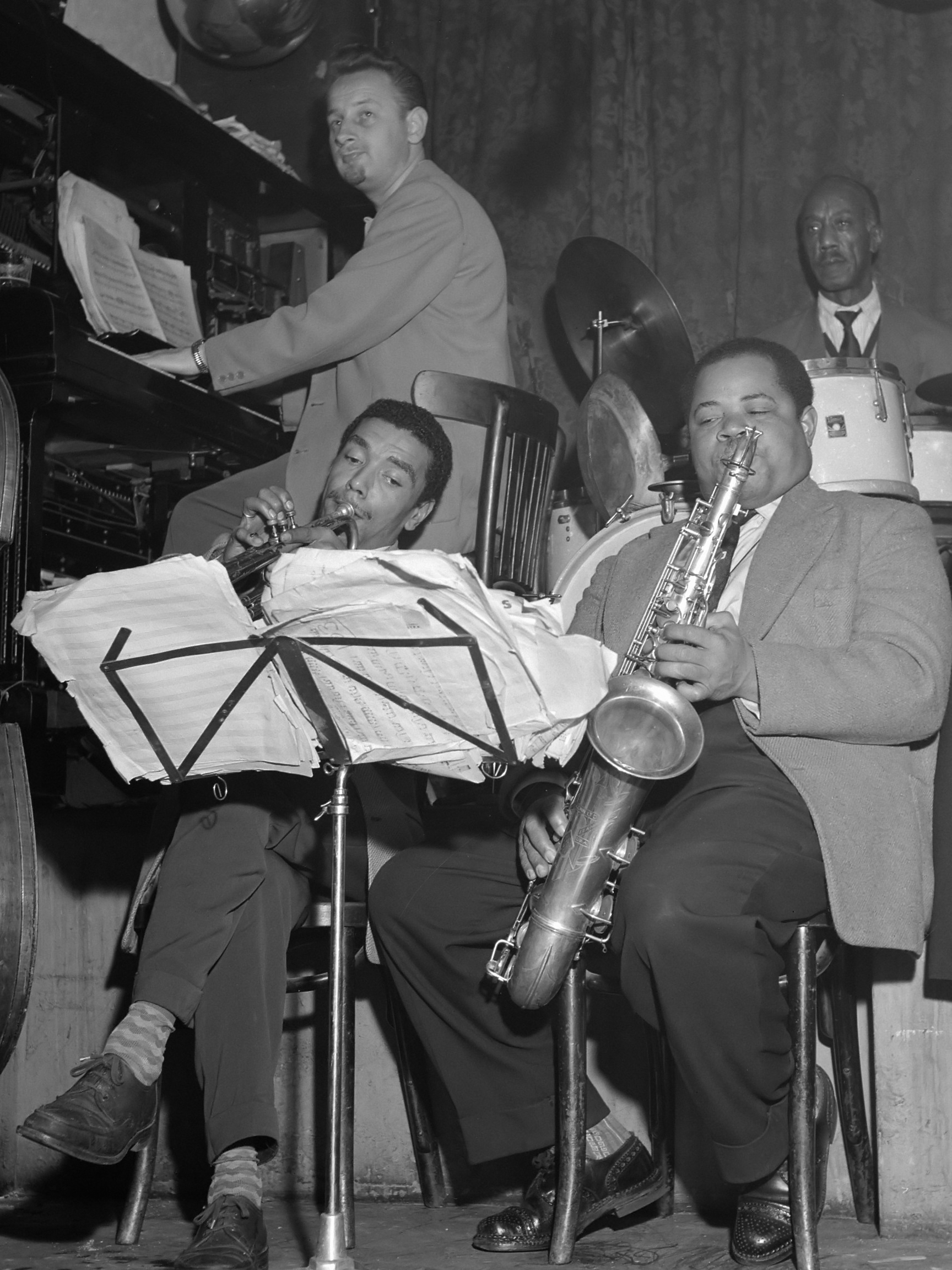 Jazzconcert in dancing Casablanca aan de Zeedijk te Amsterdam, 24 januari 1956